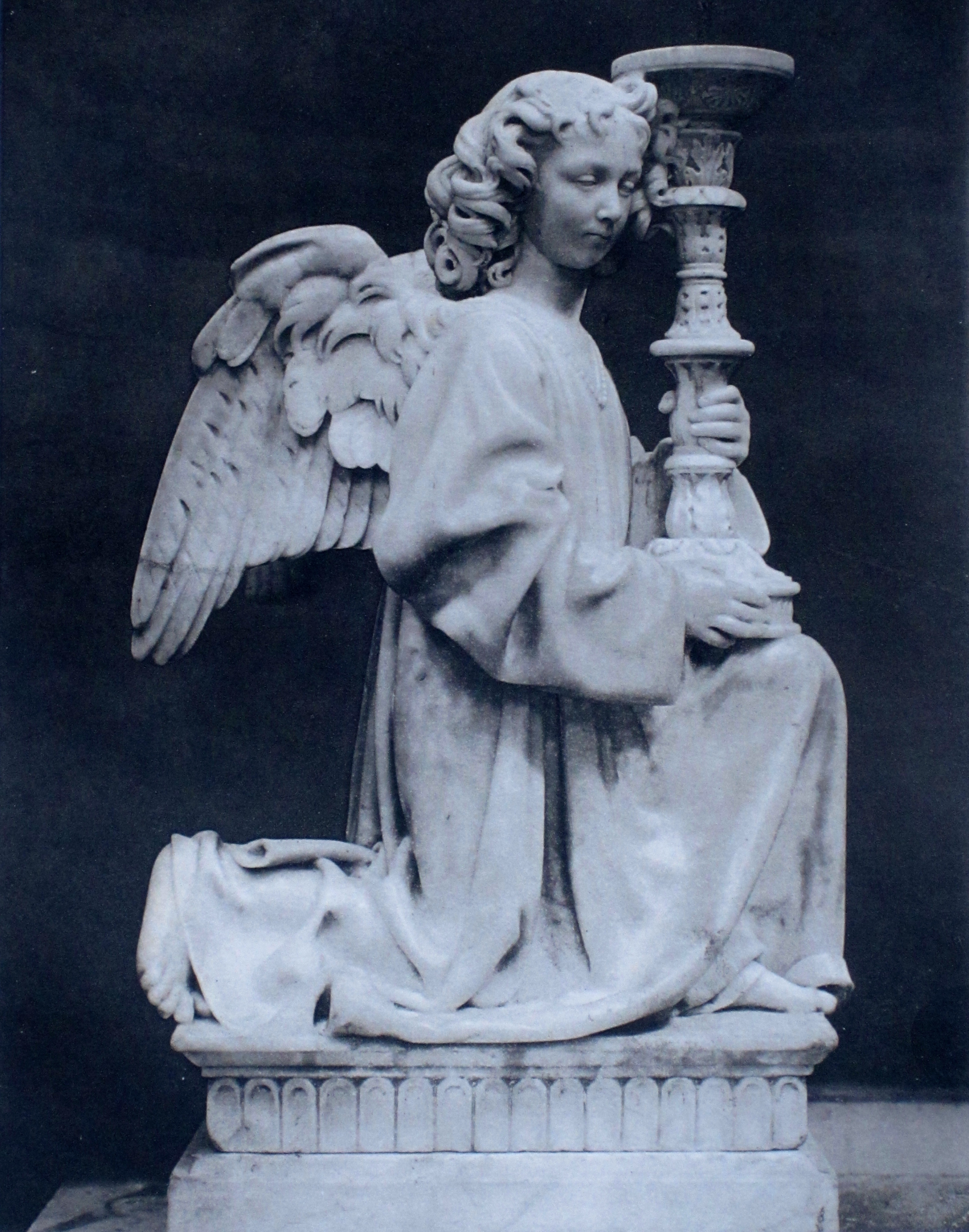 Ange porte-candélabre de Niccolo dell'Arca. Marbre.